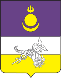 Герб Улан-Удэ (1998-2007). Дата принятия: 24.09.1998